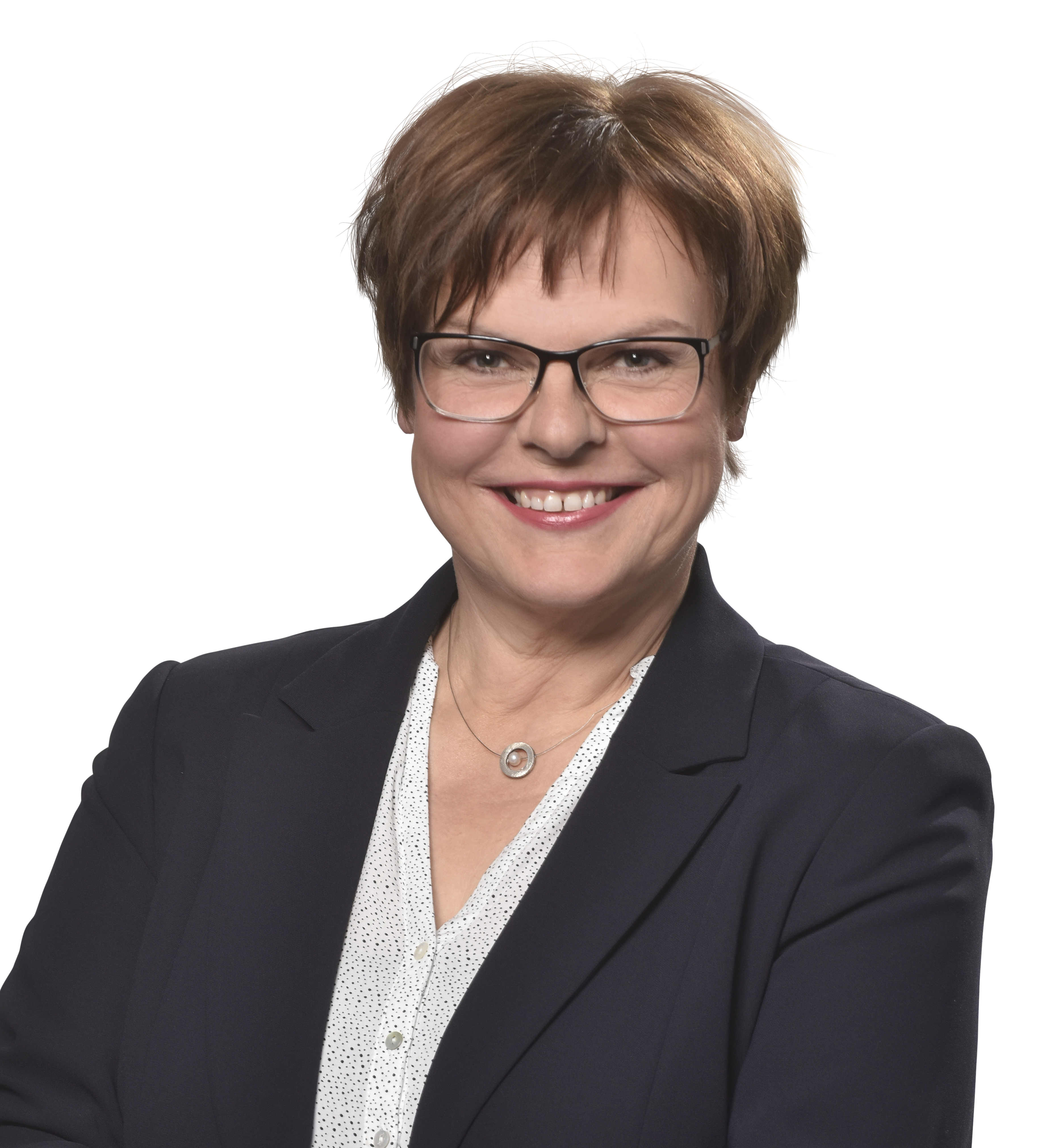 Die Landtagsabgeordnete Dr. Silke Lesemann im September 2017